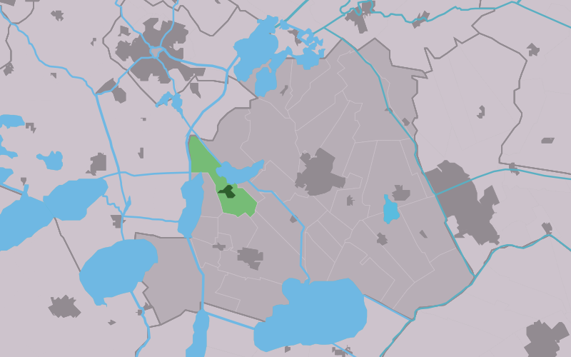 Kaartsje fan himrik fan Langwar